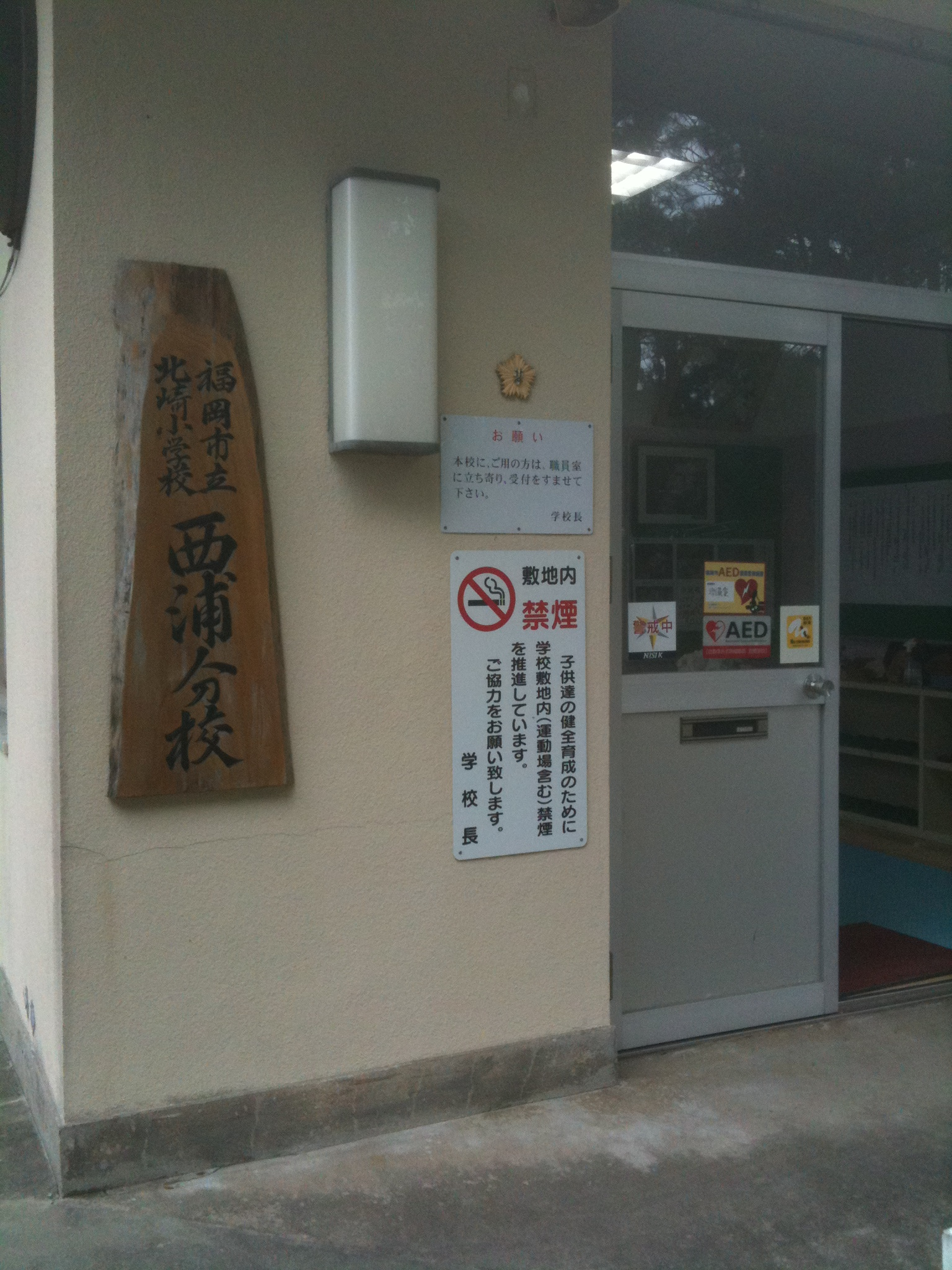 玄関（2010年2月撮影）